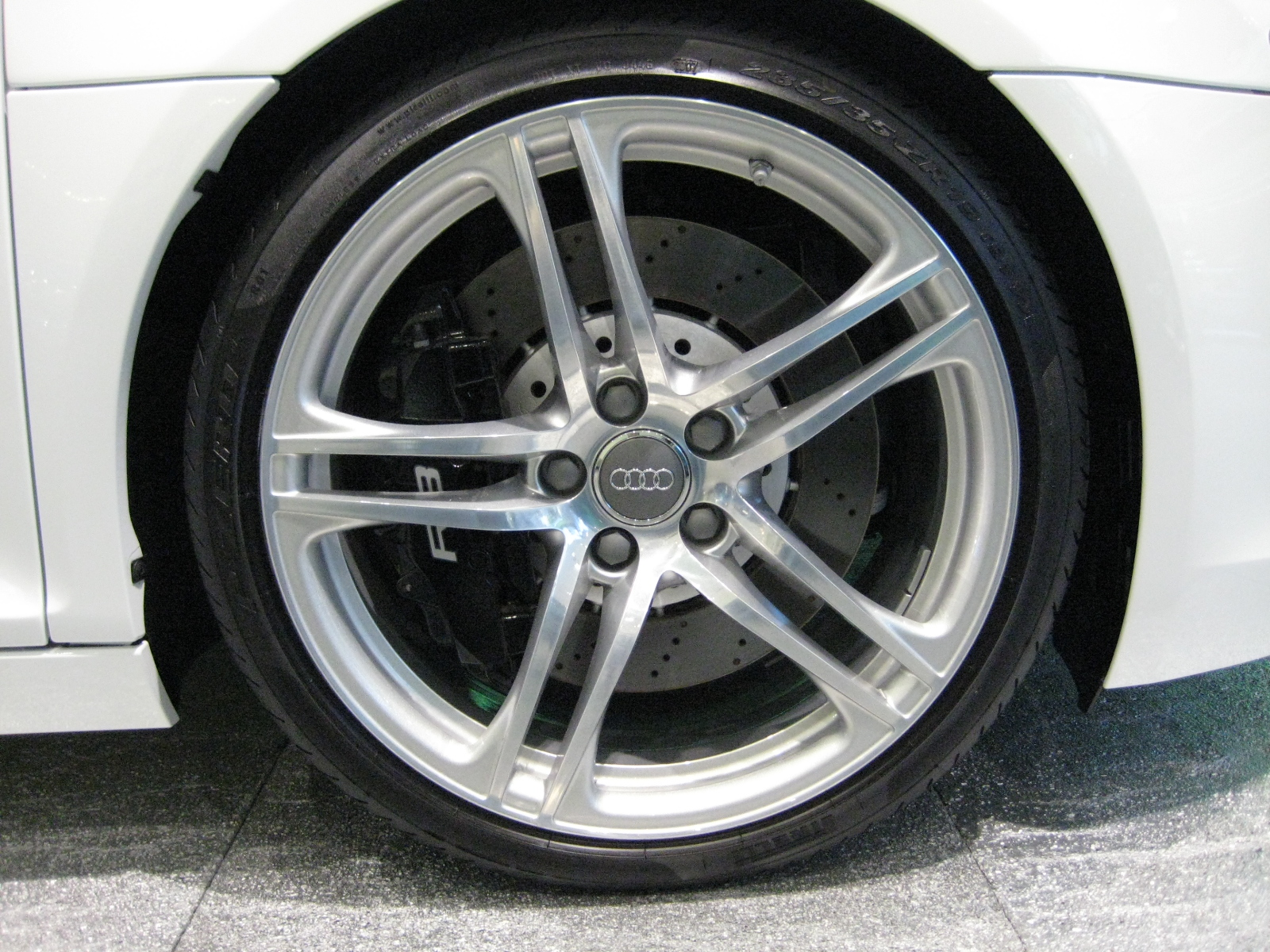 Audi R8 Wheel